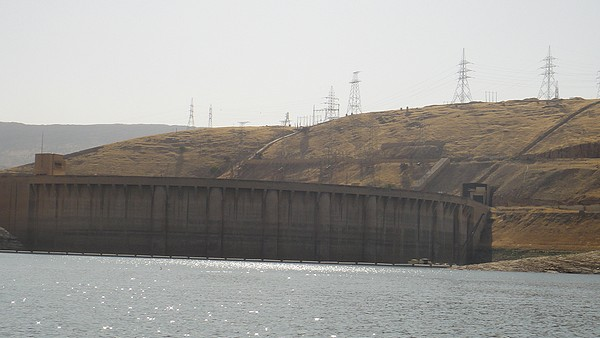 سد دوكان بتاريخ 1 أيلول 2012 بعدسة Licensing التقط هذه الصورة